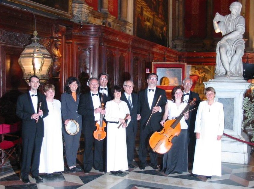 La sezione strumentale dei Madrigalisti di Genova con il Maestro Leopoldo Gamberini (Scuola Grande di San Rocco - Sala Superiore, Venezia)